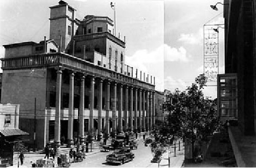 50年代的国货陈列馆